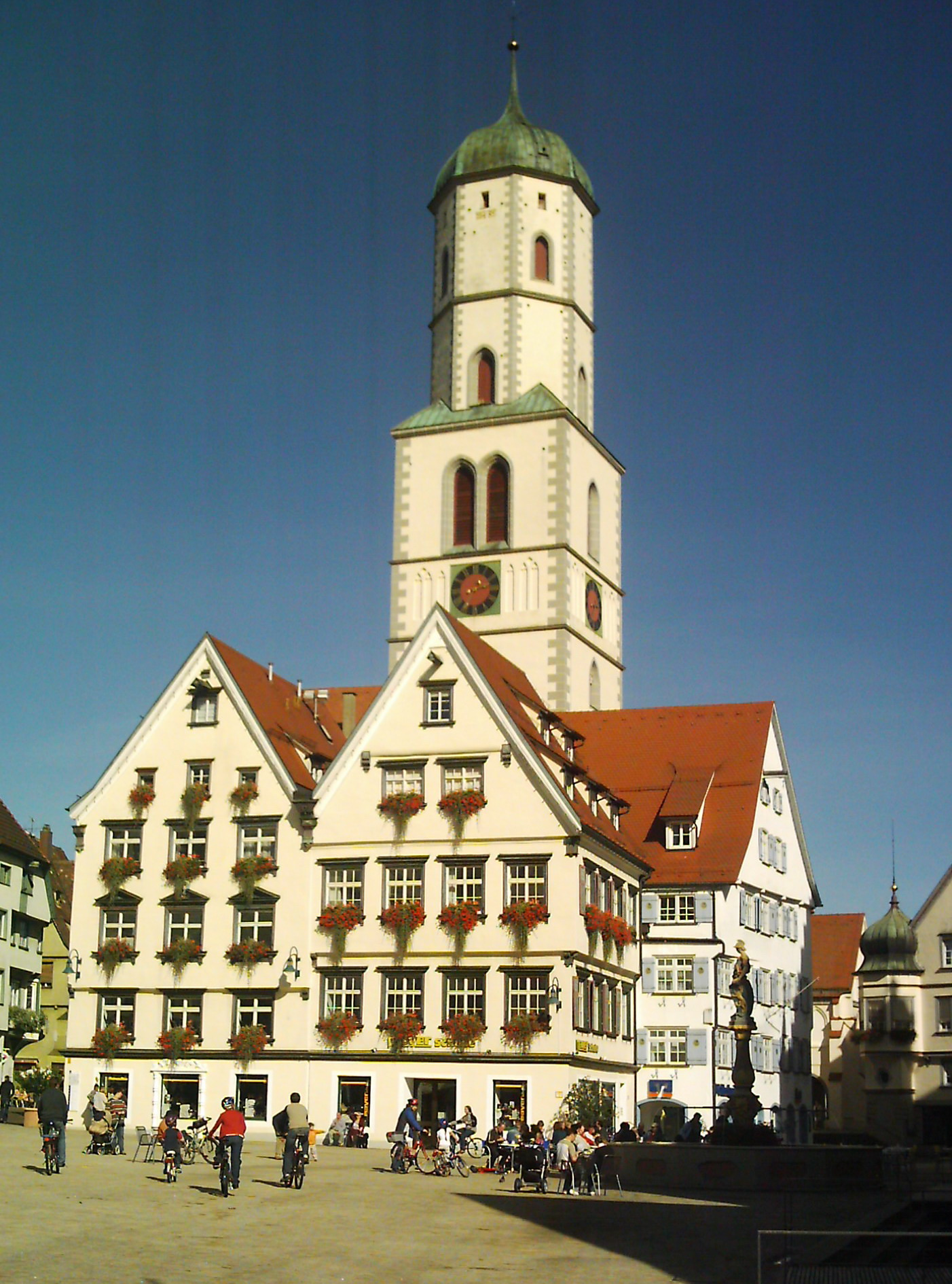 Biberach an der Riß, St. Martin und Marktplatz, Oberschwaben, Deutschland